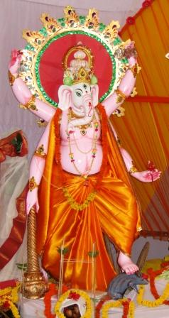 ঢাকার পূজা মণ্ডপে গণেম মূর্তি, ২০১০।